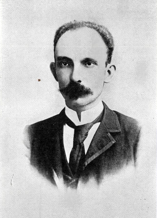 Retrato más conocido de José Martí hecho en Kingston, Jamaica (1892). Foto de Juan Bautista Valdés. Publicado por primera vez en Cuba en "El Fígaro" (La Habana, 1899).